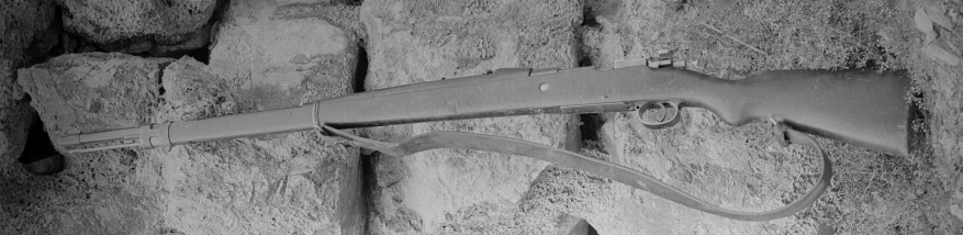 Repetiergewehr M.14 in einer Feldtelefon-Station am Rombon.